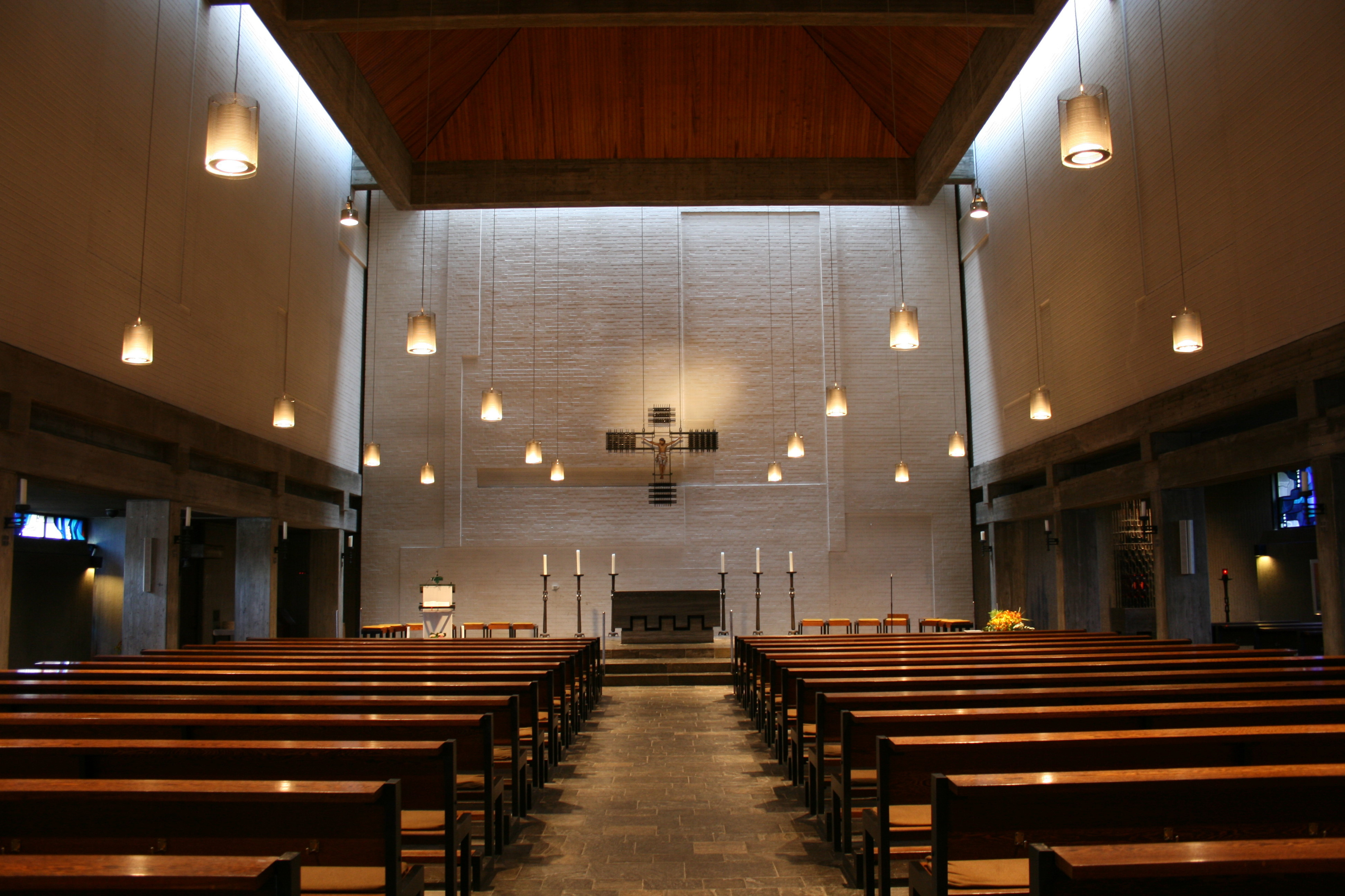 Wuppertal-Ronsdorf: Sankt Joseph